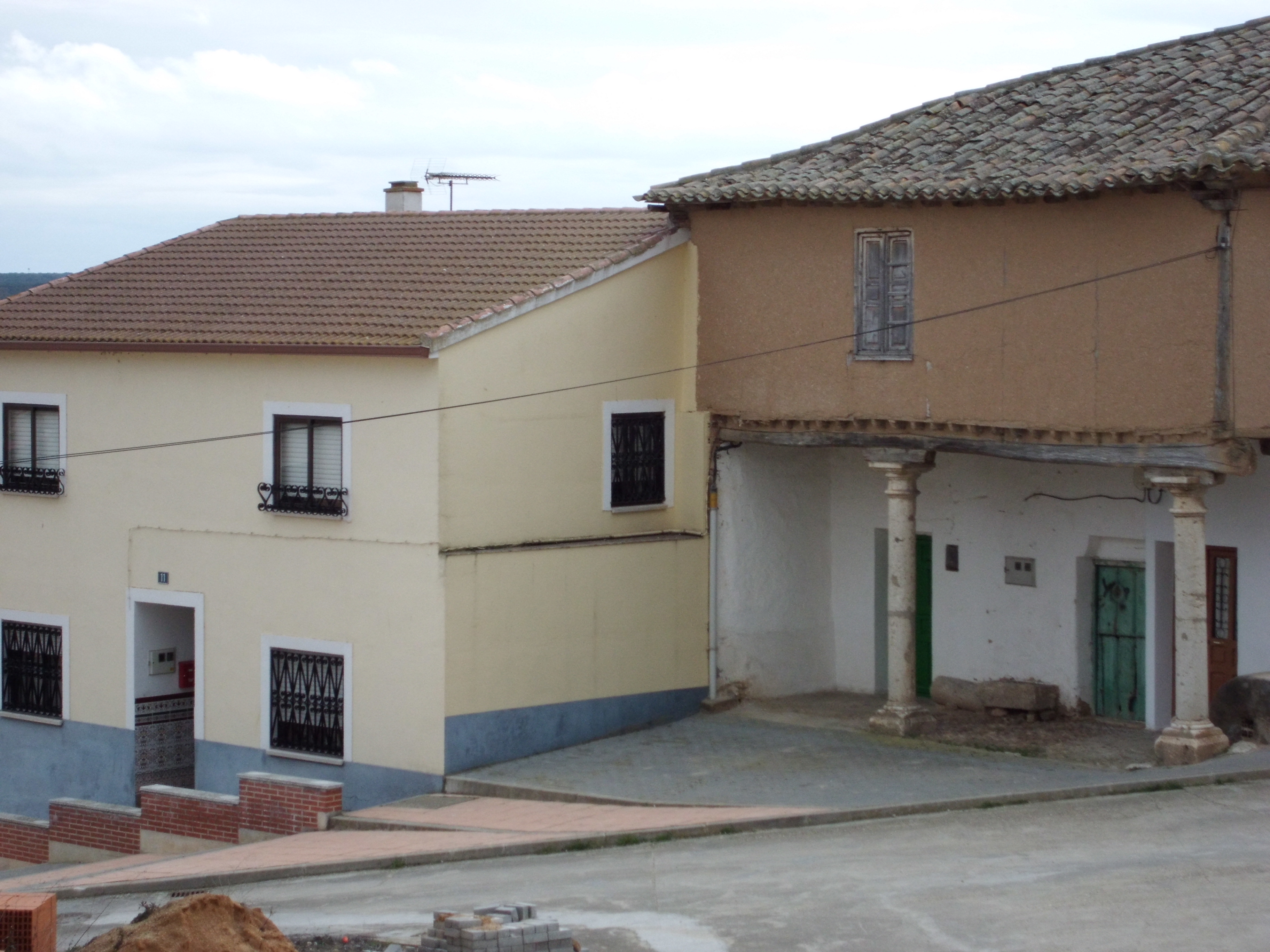 Torrecilla de la Abadesa, provincia de Valladolid (España). Casa de adobe con entramado de madera situada frente a la iglesia. Tiene dos pisos: el inferior con un soportal con dos columnas de piedra de orden toscano y zapatas lisas de madera.